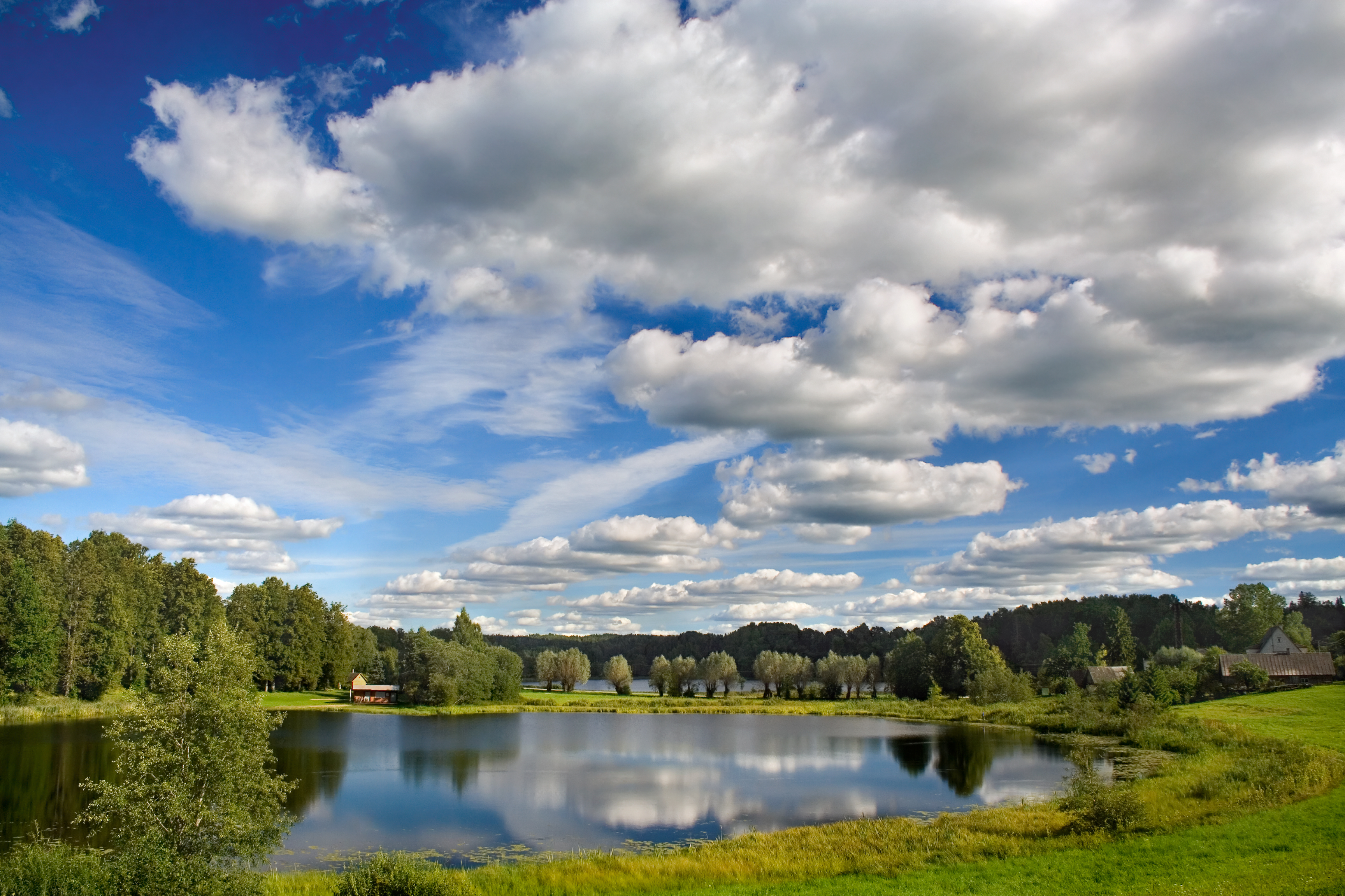 Kaussjärv